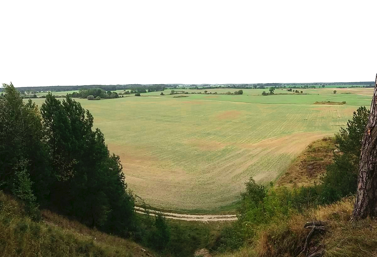 Widok z góry w Chełmnie w stronę wsi Konin.